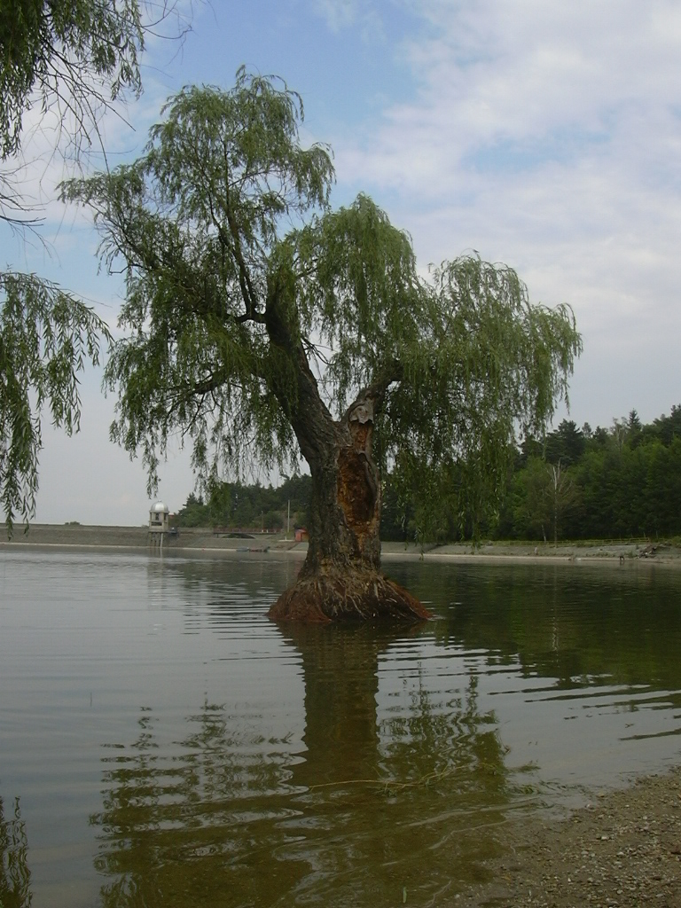 Vrba z plumlovské přehrady z pláže pod vrbičkami